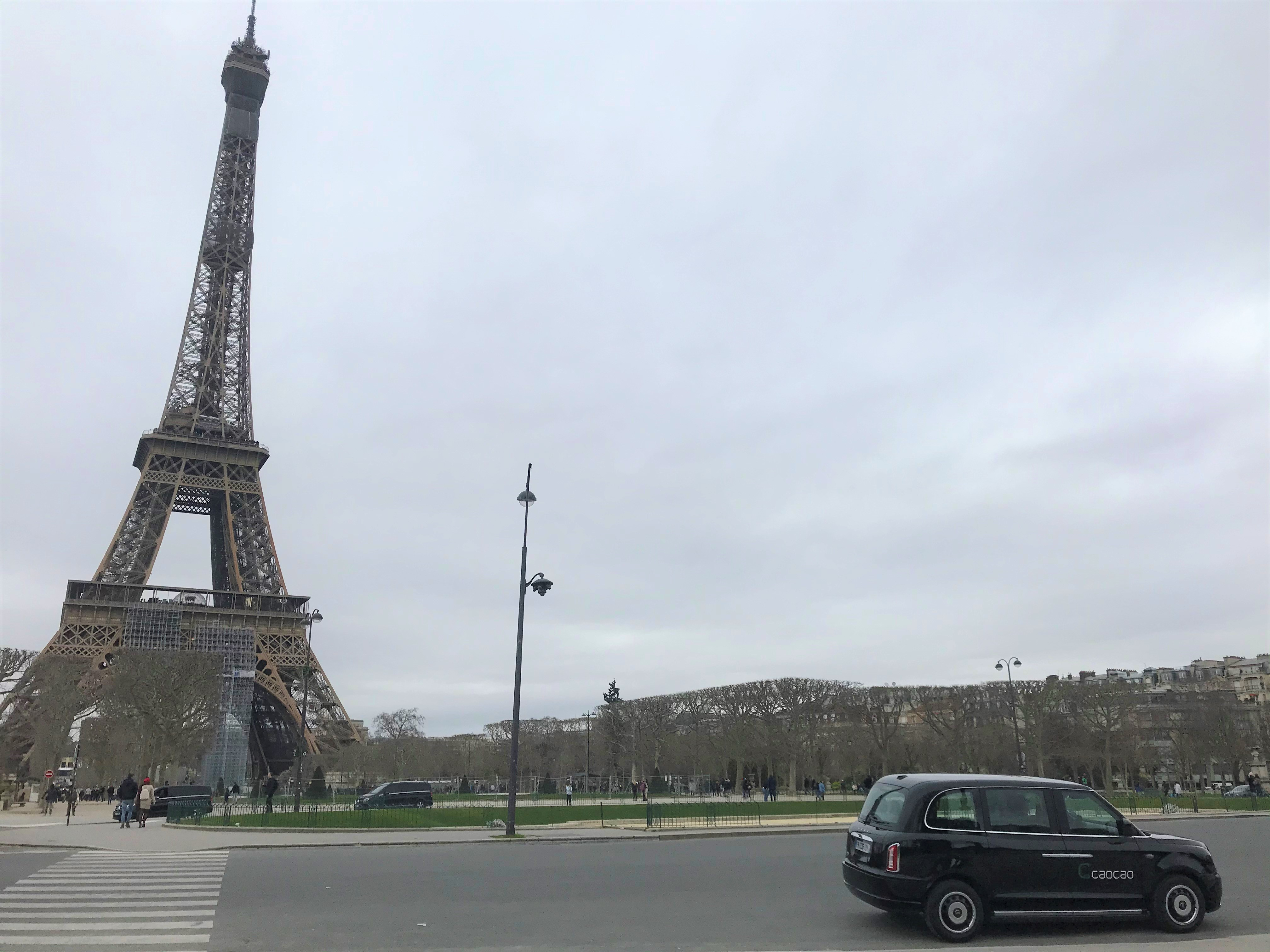 Véhicule VTC Caocao Mobility à Paris